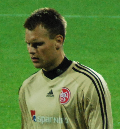 Fodboldspilleren Nicolai Larsen fra AaB. Her under straffesparkskonkurrencen i pokalkampen imellem Viborg FF og AaB på Viborg Stadion.